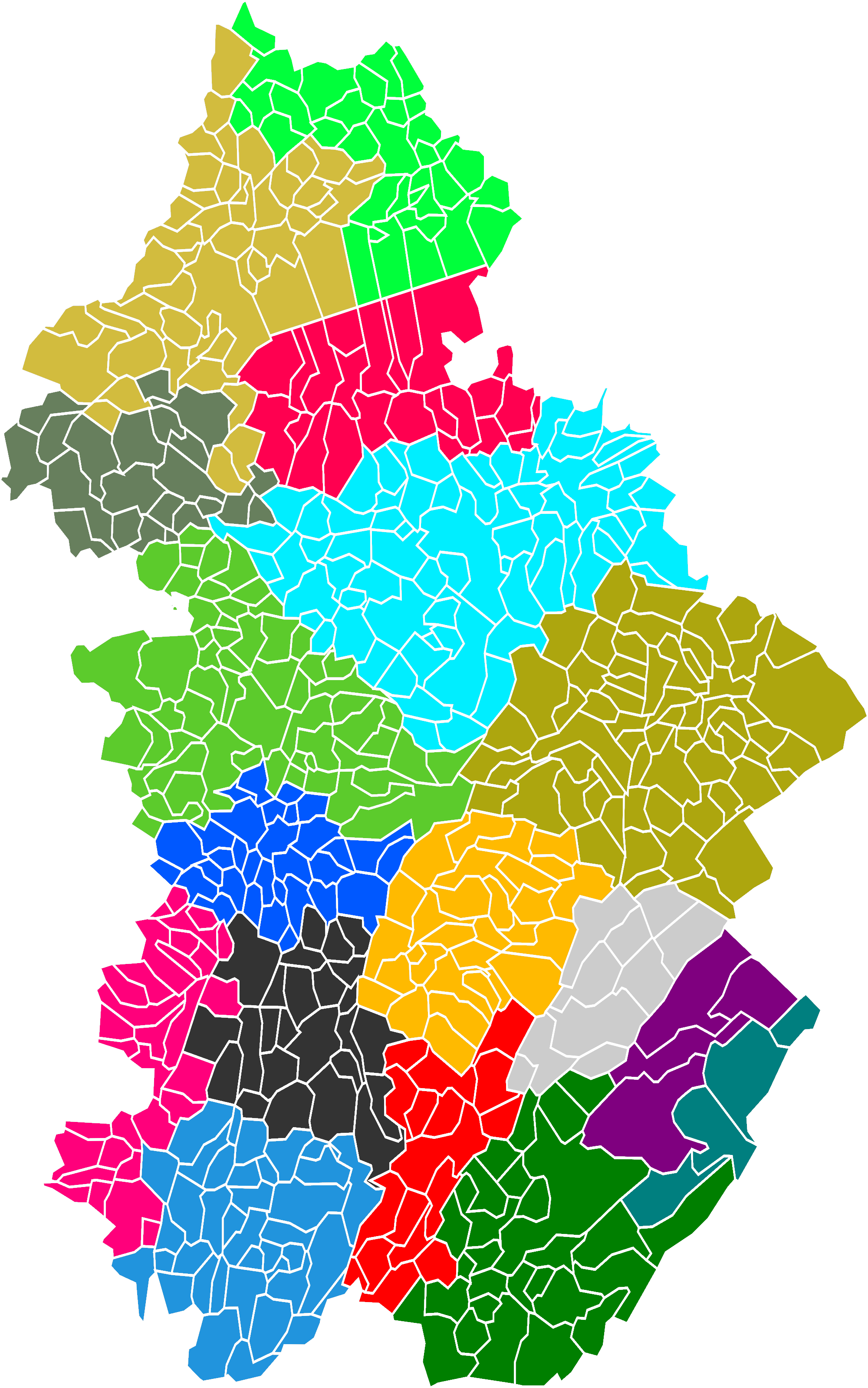 La carte des intercommunalités du département du Jura en France au 1er janvier 2017. Base cartographique : Blank Map of Jura Department, France, with Communes.svg.